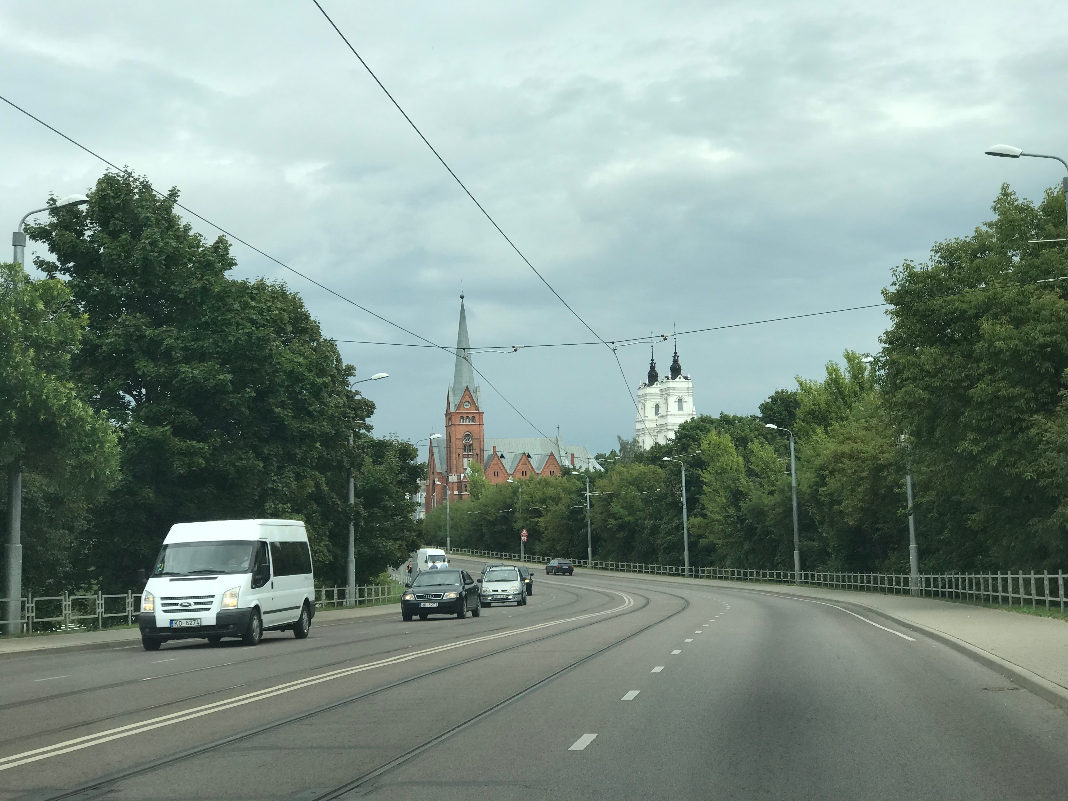 Даугавпилс